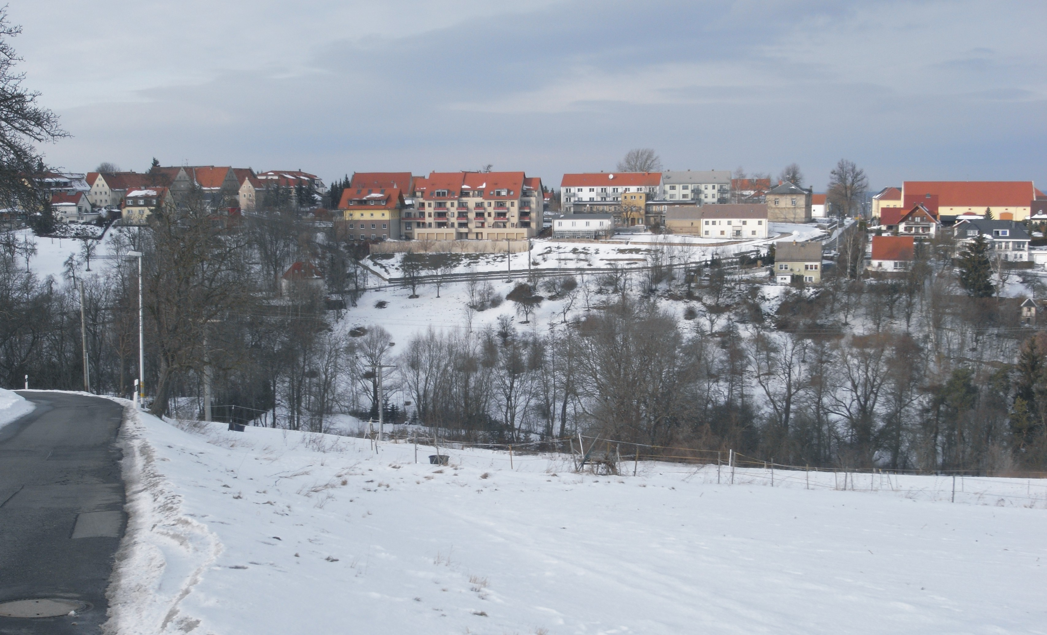 Goppeln und der Gebergrund (Deutschland, Sachsen, Gemeinde Bannewitz)